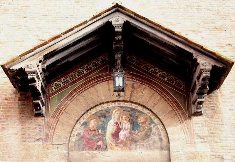 descrizione: lunetta affrescata sulla facciata della Chiesa di San Francesco a Grosseto lavoro personale di Vinattieri Matteo che lascia in pubblico dominio il 05/02/2007; foto digitale scattata nell'inverno 2006